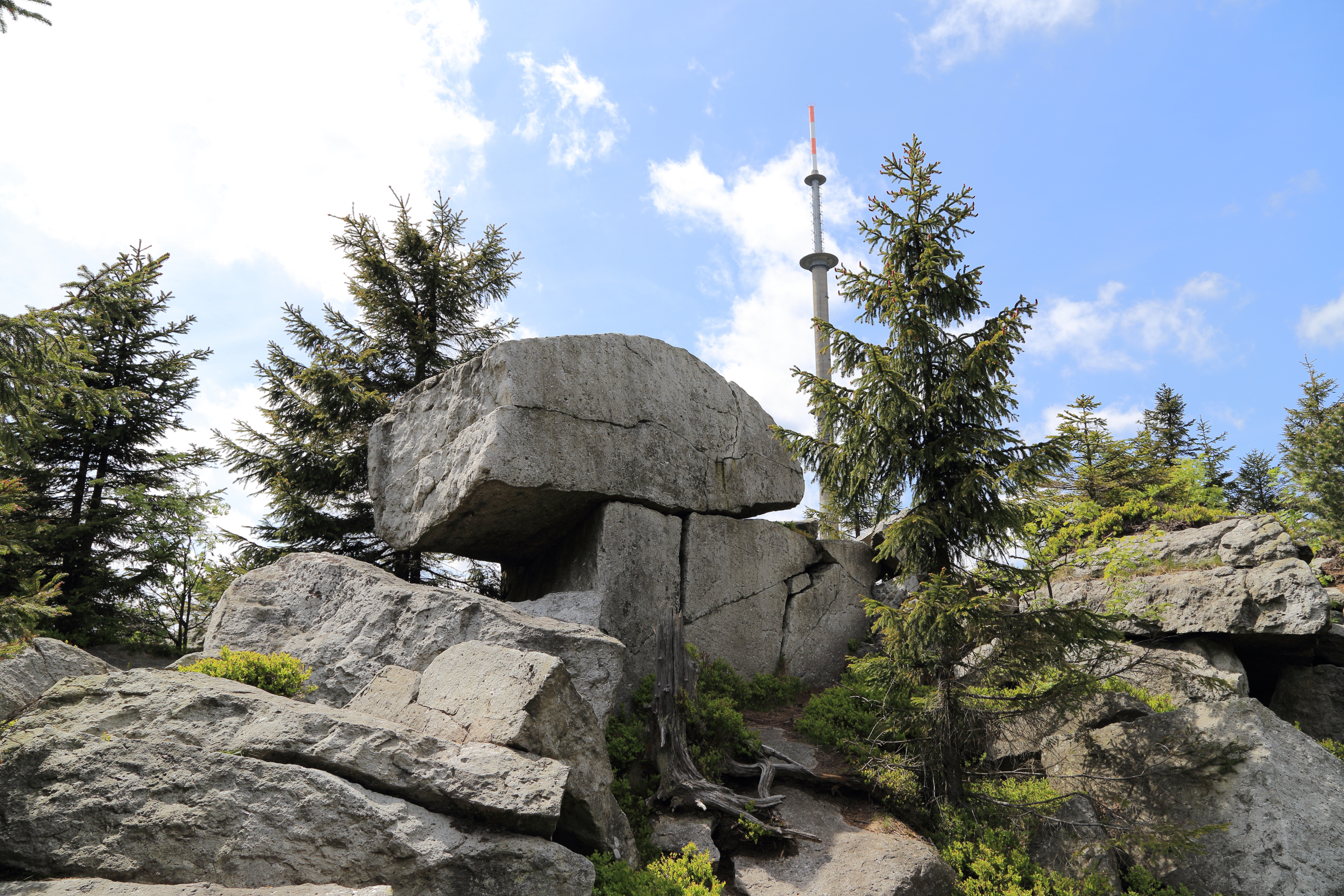 Goethefelsen am Ochsenkopf Geotop-Nummer: 472R004 5936GT000020 Bischofsgrüner Forst, Bayreuth 5936 Bad Berneck i.Fichtelgeb. R: 4486664 H: 5543727 1012 m ü.NN L: 40 m, B: 15 m, H: 5 m, F: 600 qm Fichtelgebirge